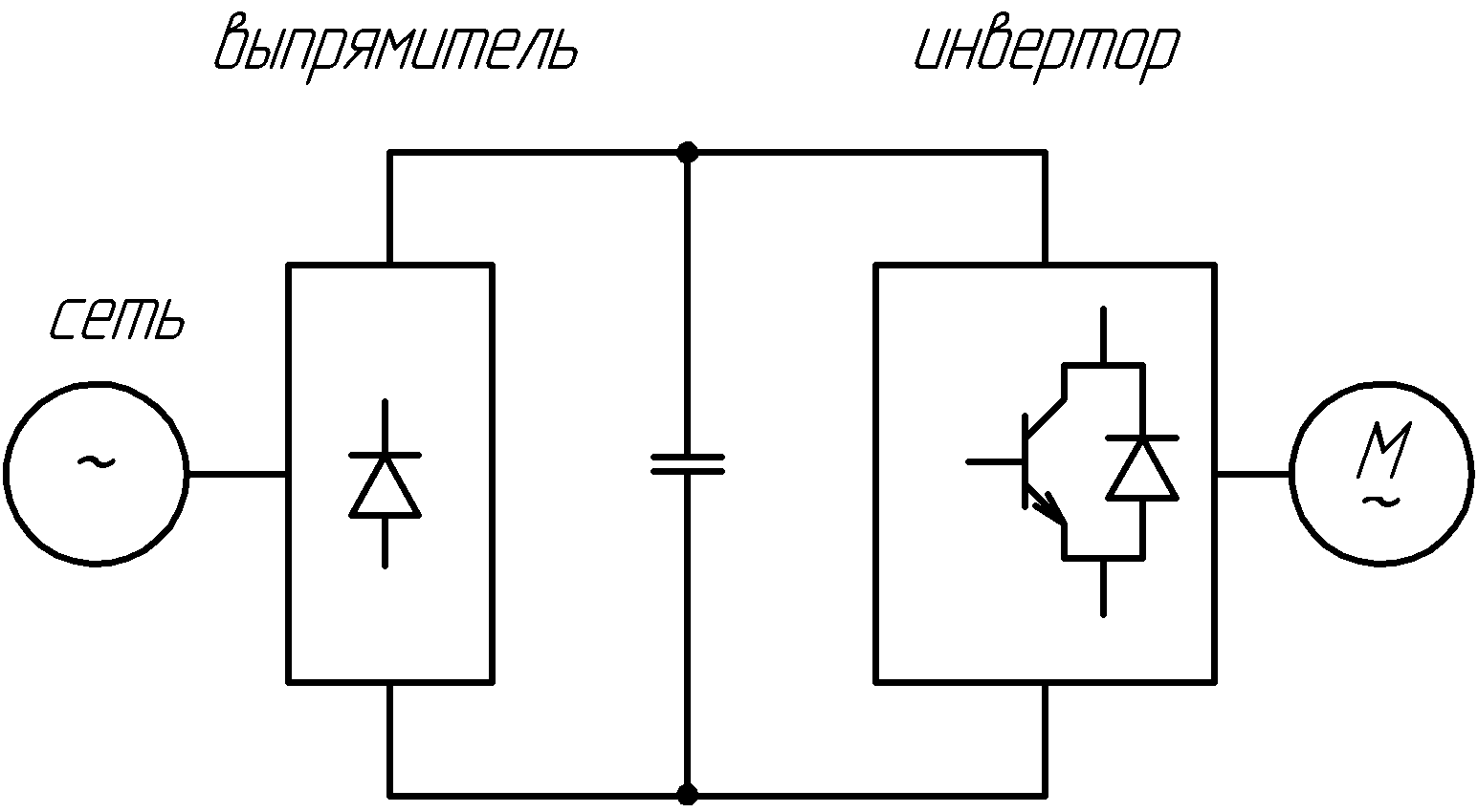 Преобразователь частоты, представляющий собой источник напряжения